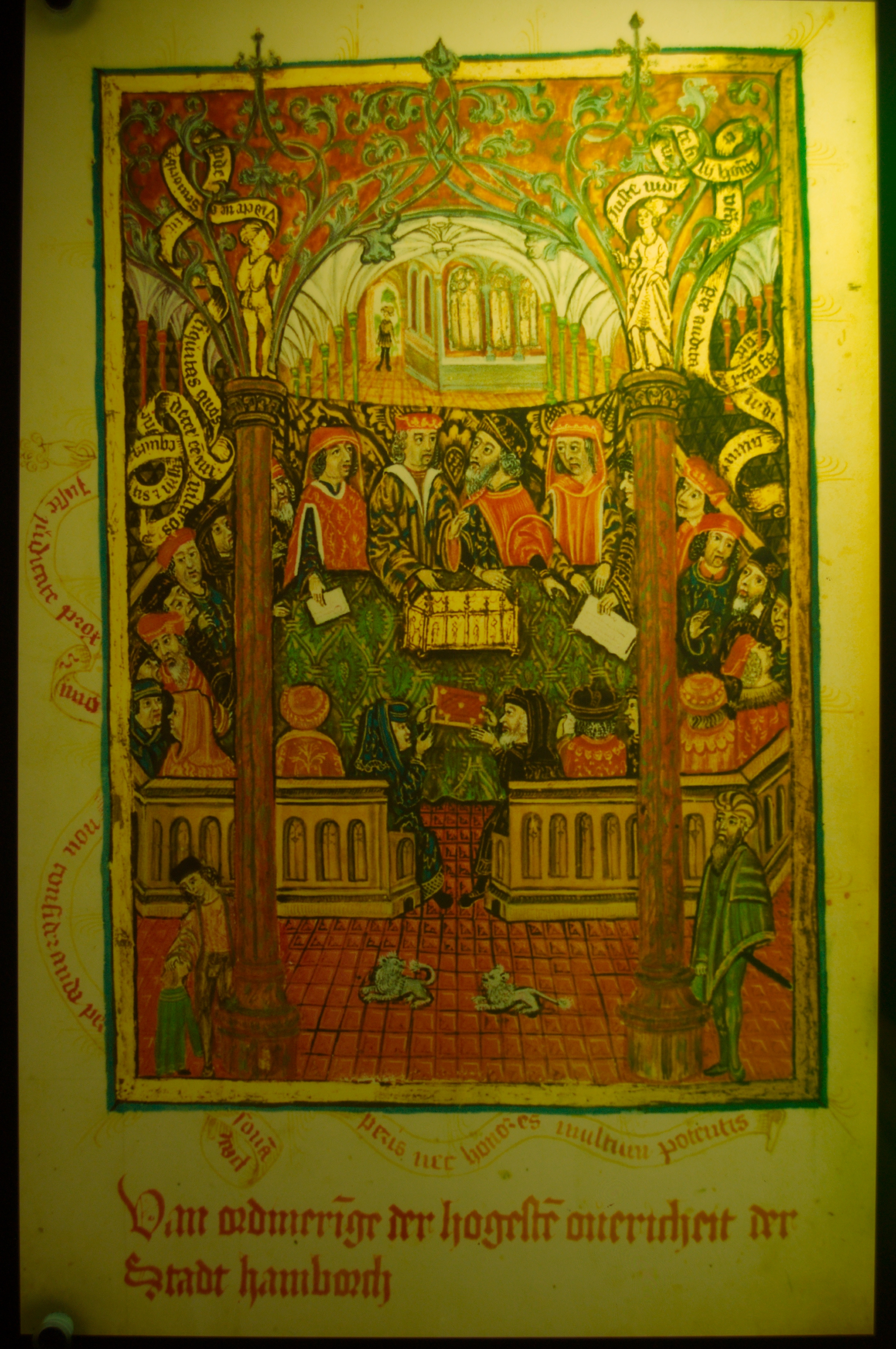 Titelbild des Stückes A des Hamburger Stadtrechts von 1497, Rechtsgebiet Verfassungsrecht und Ratsgerichtsordnung. Hintergrundbeleuchtete Reproduktion in der Ausstellung des Museums für Hamburgische Geschichte.